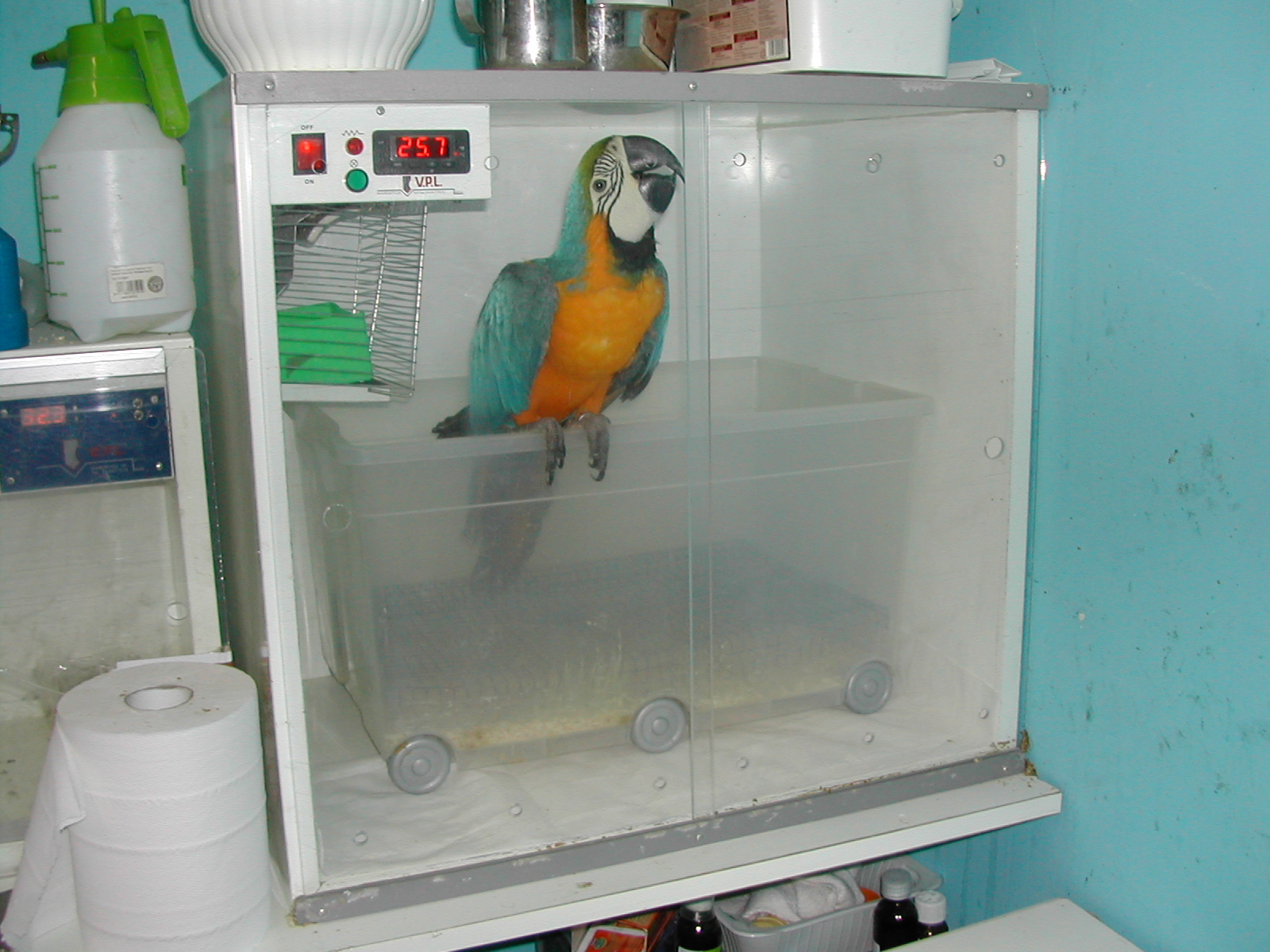 Ara Ararauna in cura